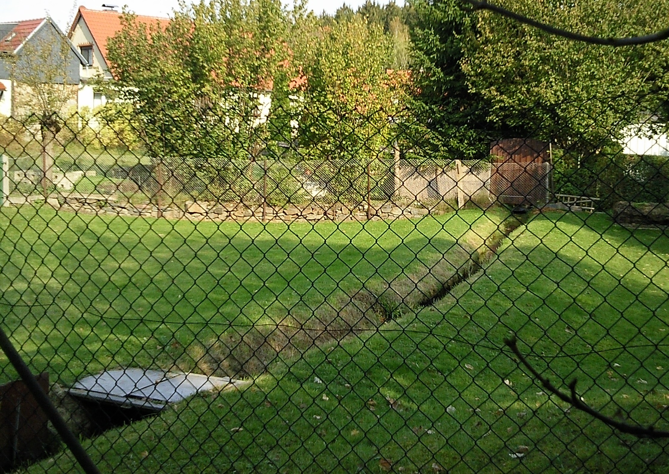 Flösse in Straßberg